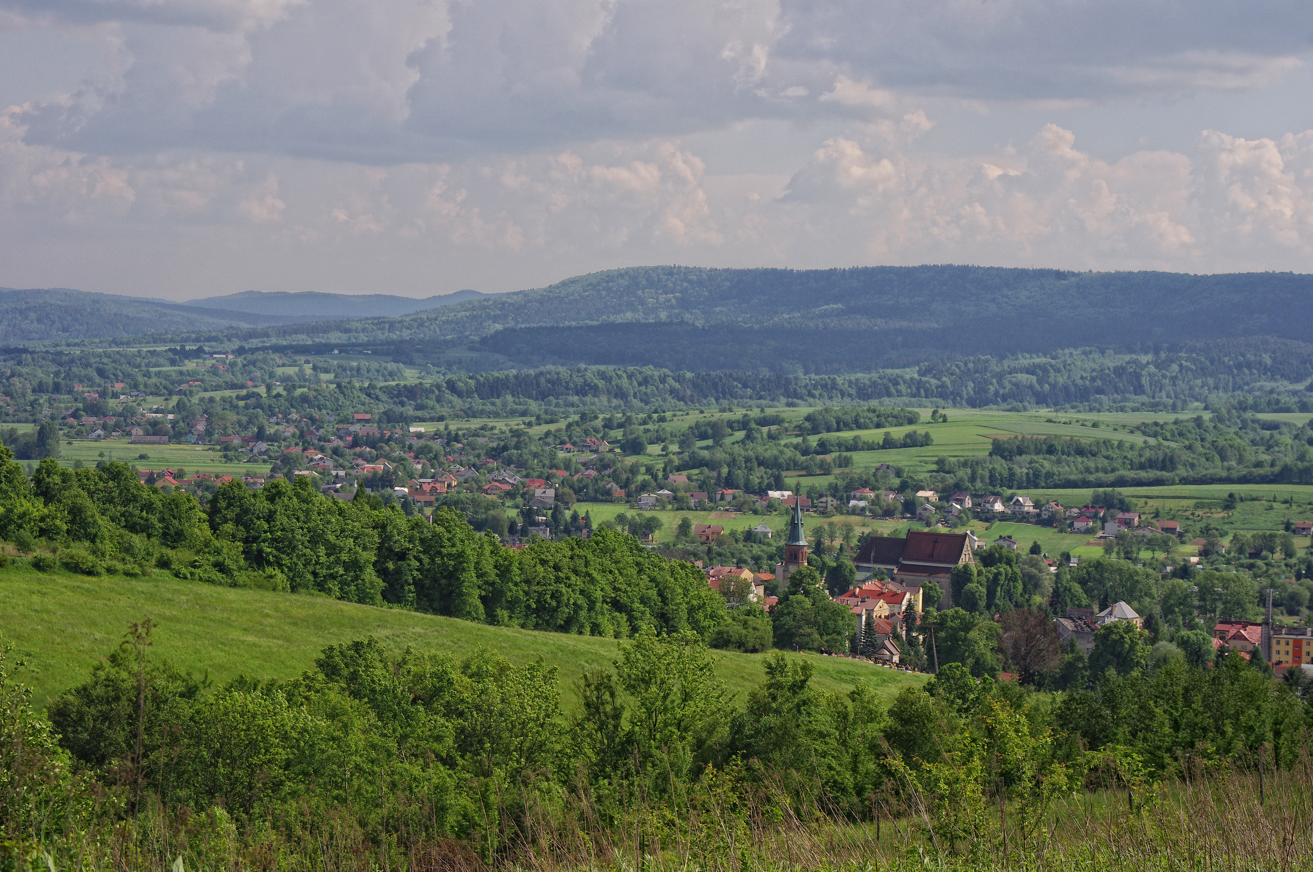 Widok na Strzyżów ze stoku narciarskiego.